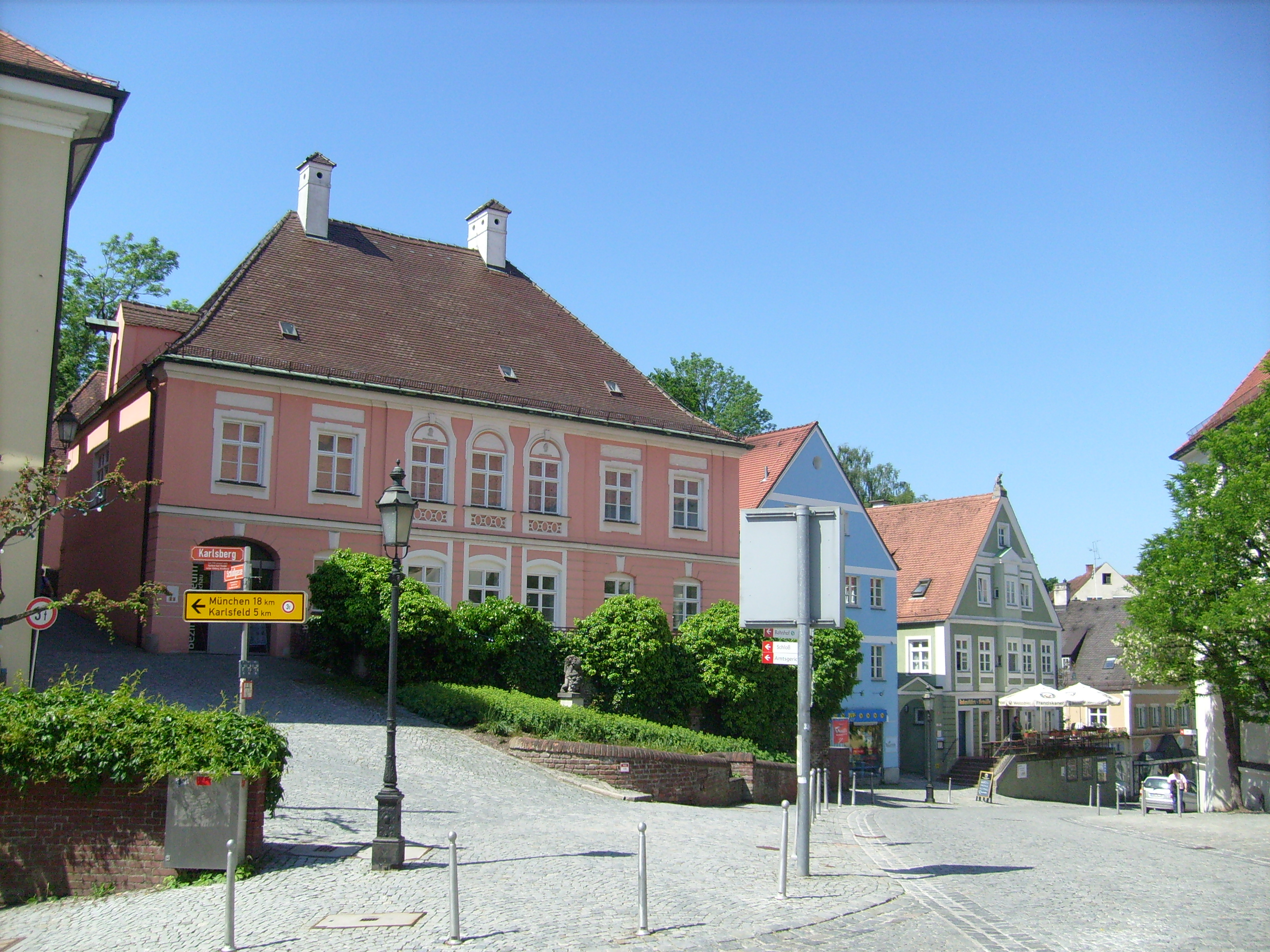 06.06.2010. _ Dachau